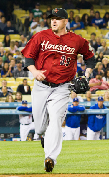 Brett Myers